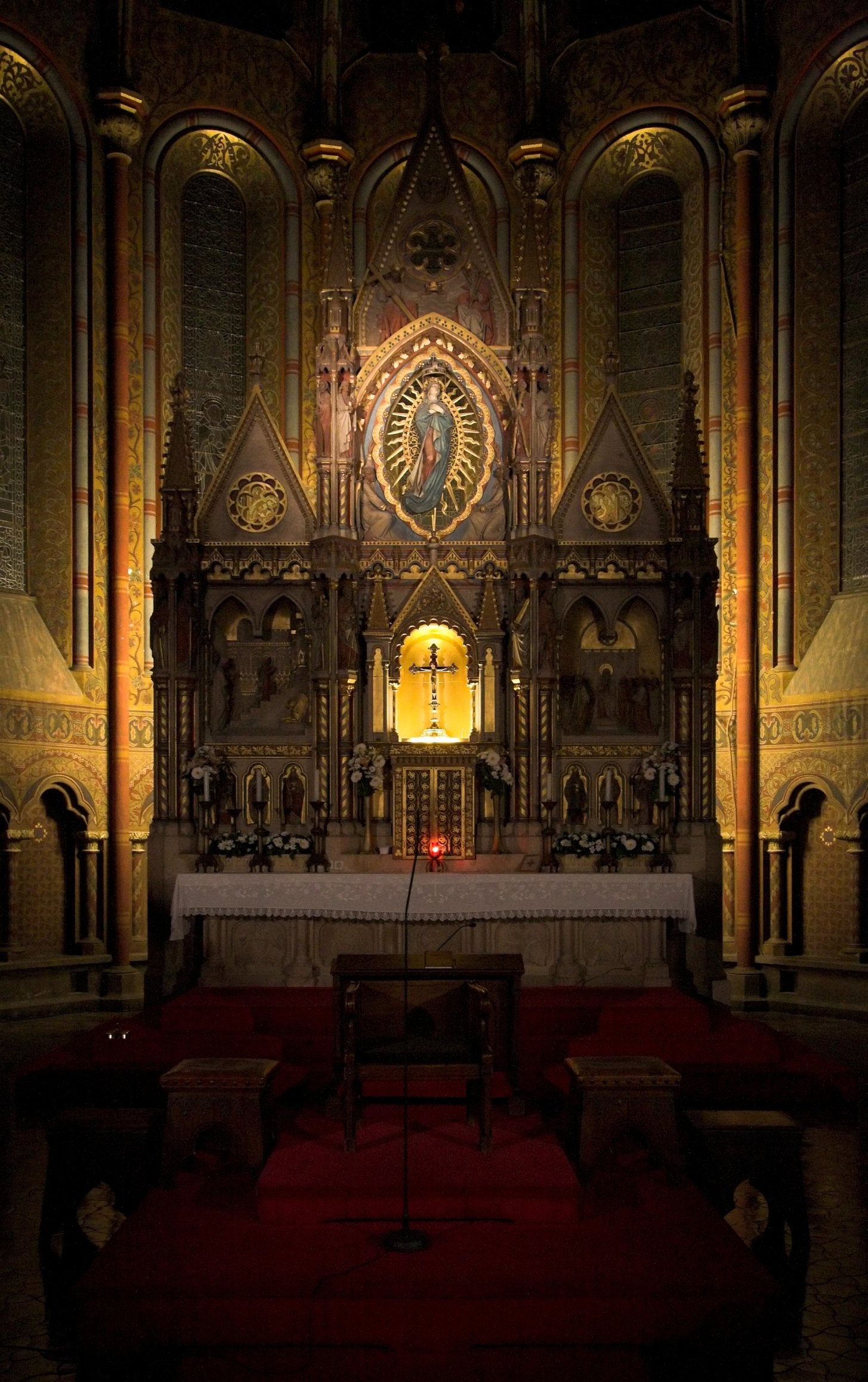 A Mátyás-templom oltára éjszakai kivilágítással a templom felújítása idején.